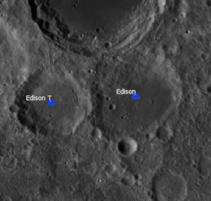 Cráter lunar Edison. Cráteres satélite (Imagen LROC)